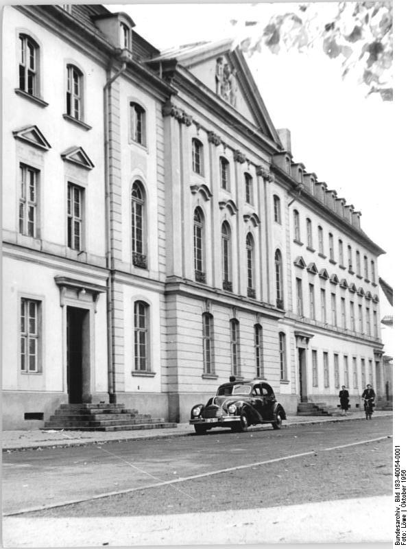 Greifswald, Universität Zentralbild Löwe 8.10.1956 Zur 500 -Jahrfeier der Universität Greifswald 14. bis 21. Oktober 1956 Am 14. Oktober 1956 beginnt die 500-Jahrfeier der Greifswalder Universität. UBz: Das alte Universitätsgebäude.